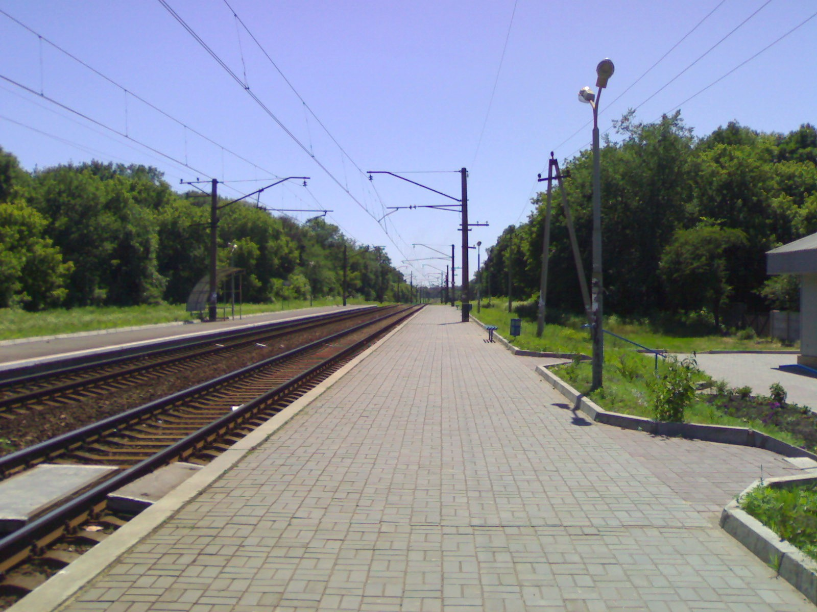 Колії залізничної платформи Беруківка, Харківській залізничний вузол Південної залізниці.